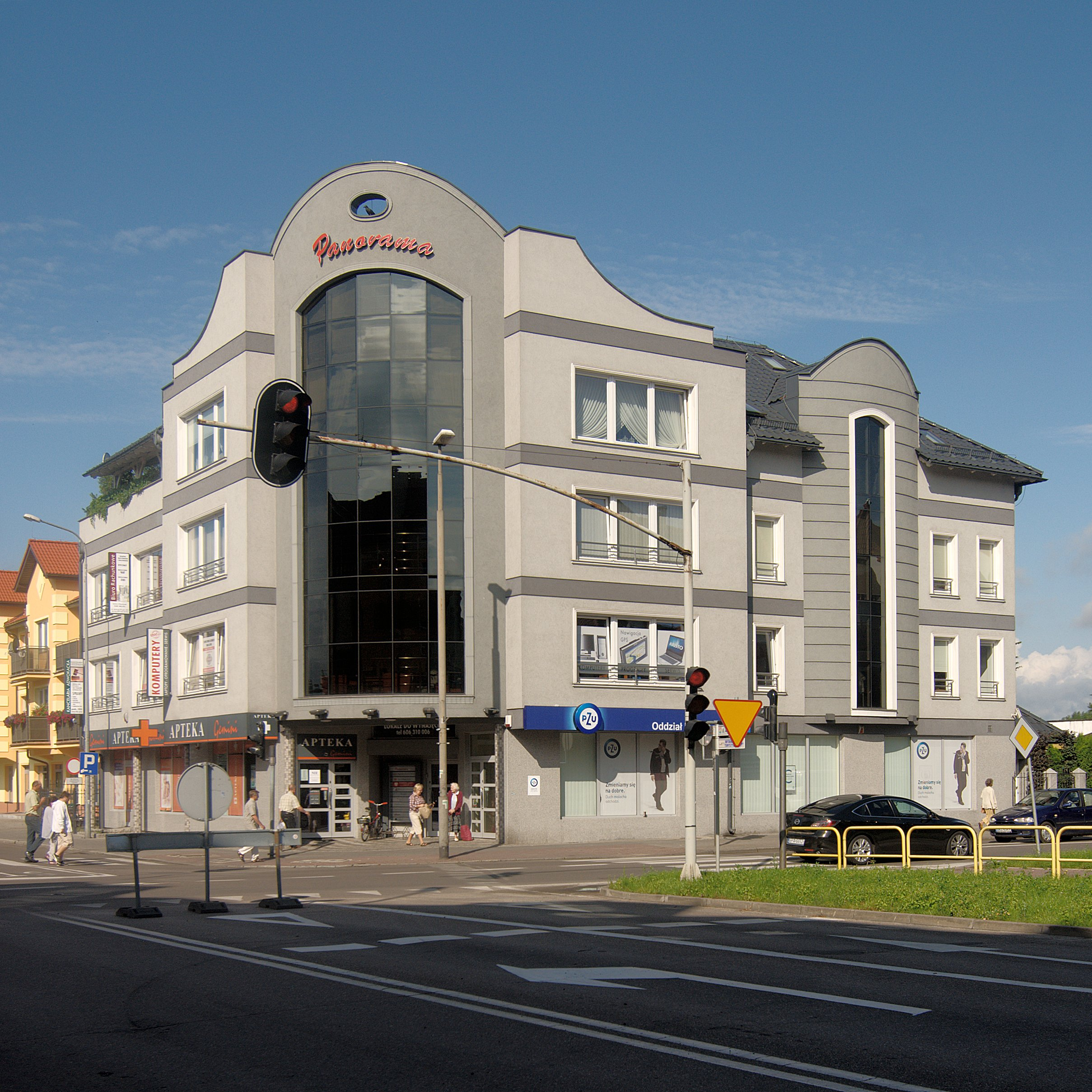 Lębork. Aleja Wolności. Panorama.